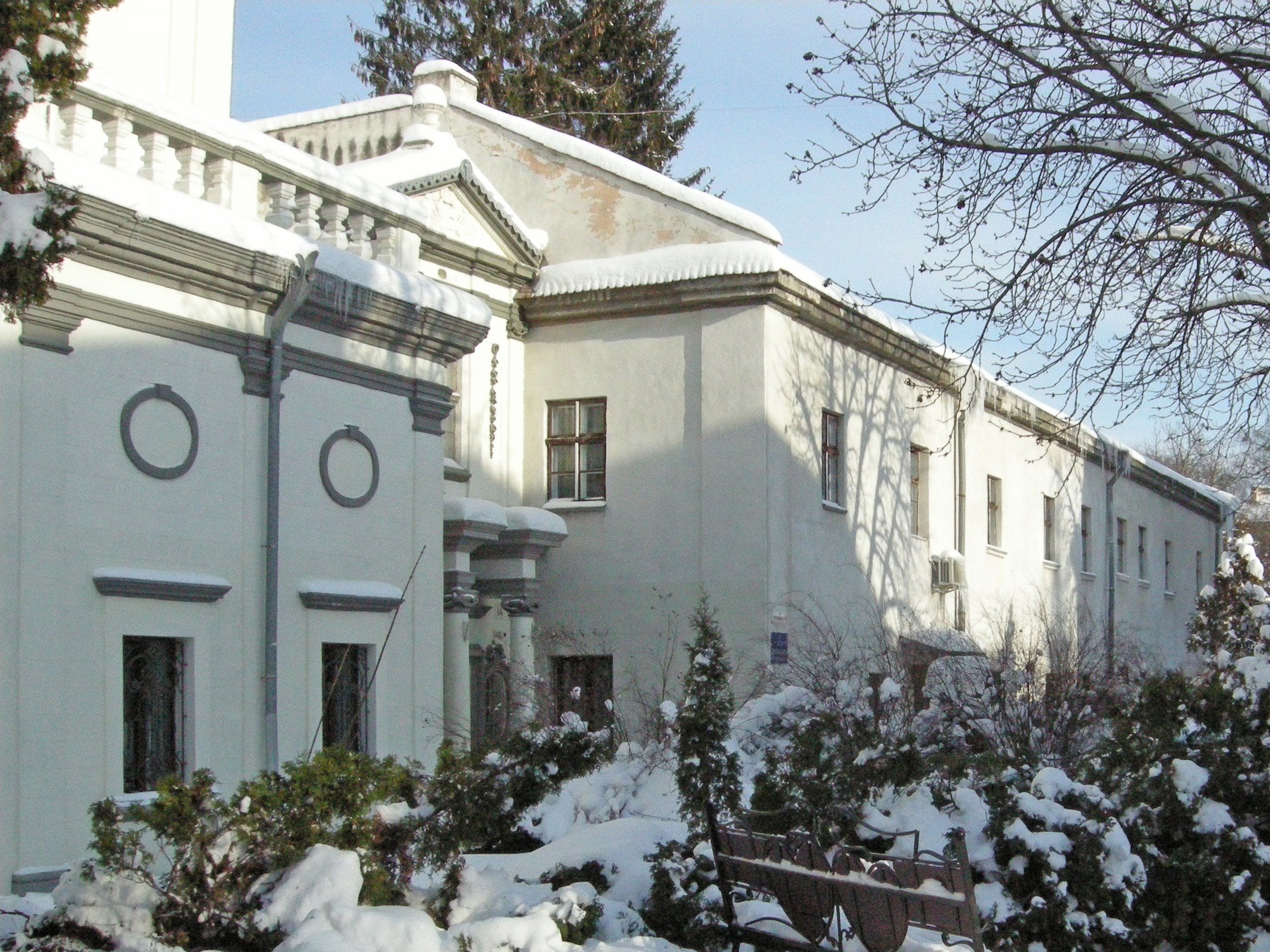 Келії Монастиря домініканів на вул. Гетьмана Сагайдачного, 14 у Тернополі.